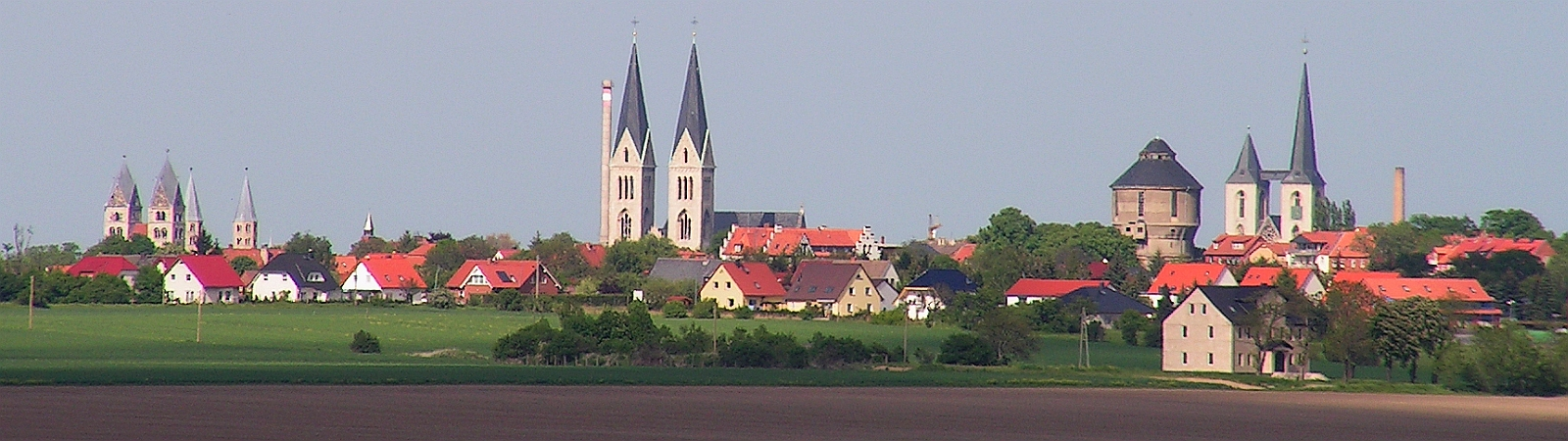 Halberstadt Stadt der Kirchen Foto 2005 Wolfgang Pehlemann Wiesbaden Germany PICT0042